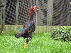 Bildbeschreibung: Hahn der Ko Shamo im Garten Quelle: selbst fotografiert Fotograf/Zeichner: Ko Shamo Datum: 2006-03-18 Sonstiges: ich stelle das Bild zur freien Verfügung